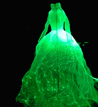 Robe lumineuse en fibre optique de Tae-Gon Kim, Biennale Internationale du Verre 2007